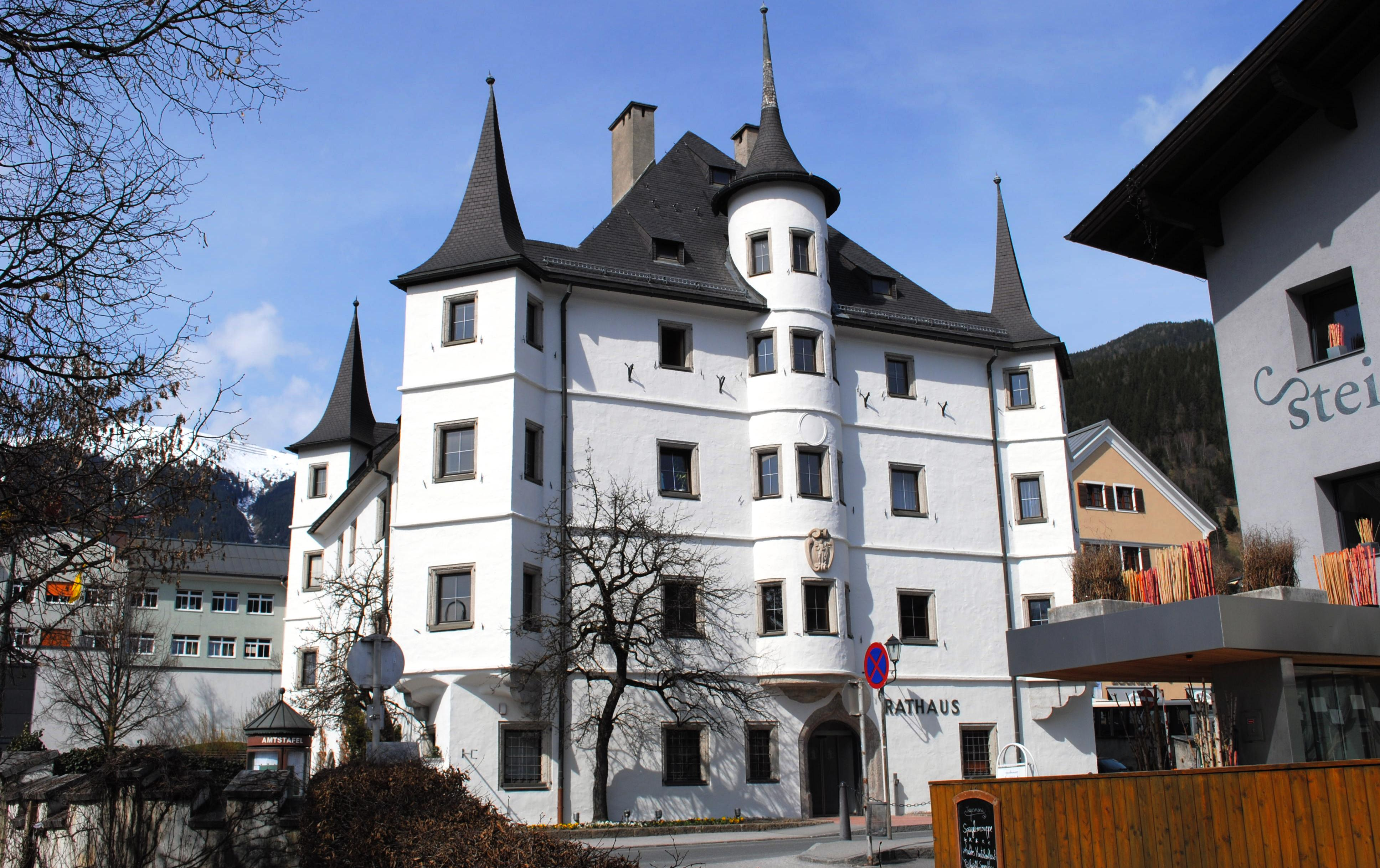 Rathaus Zell am See (Schloss Rosenberg)